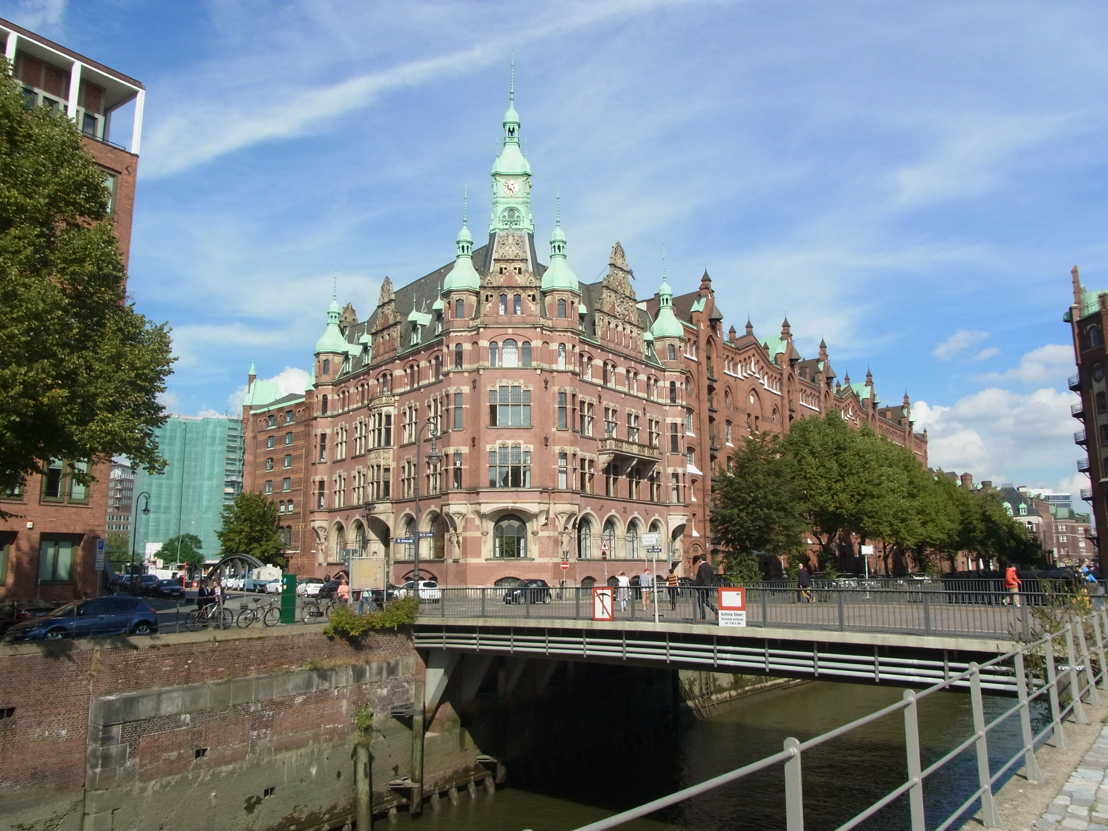 Die St. Annenbrücke führt über das St. Annenfleet, erbaut 1955. Im Hintergrund die HHLA-Verwaltung Bei St. St. Annen. This is a photograph of an architectural monument.